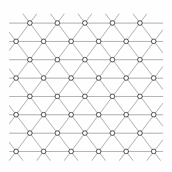 trigonal lattice